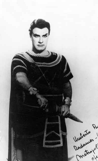 Umberto Borsò al Metropolitan di New York 1962